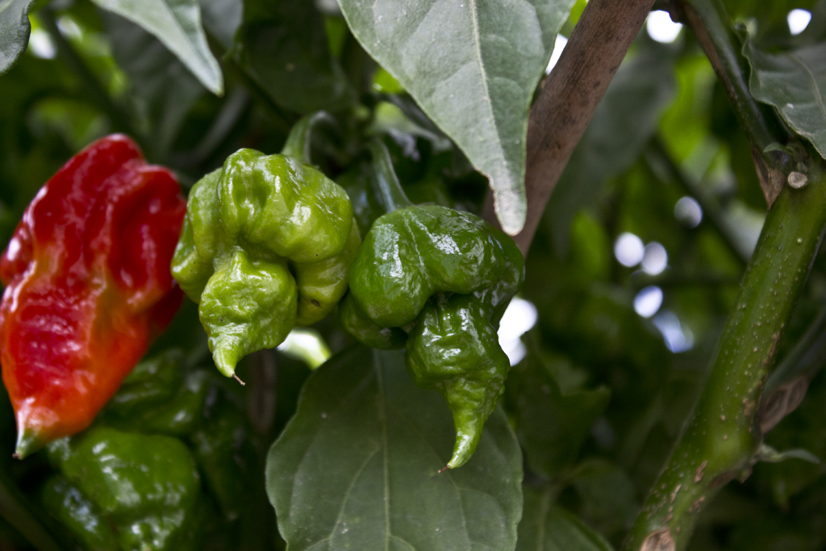 foto di peperoncini trinidad scorpion